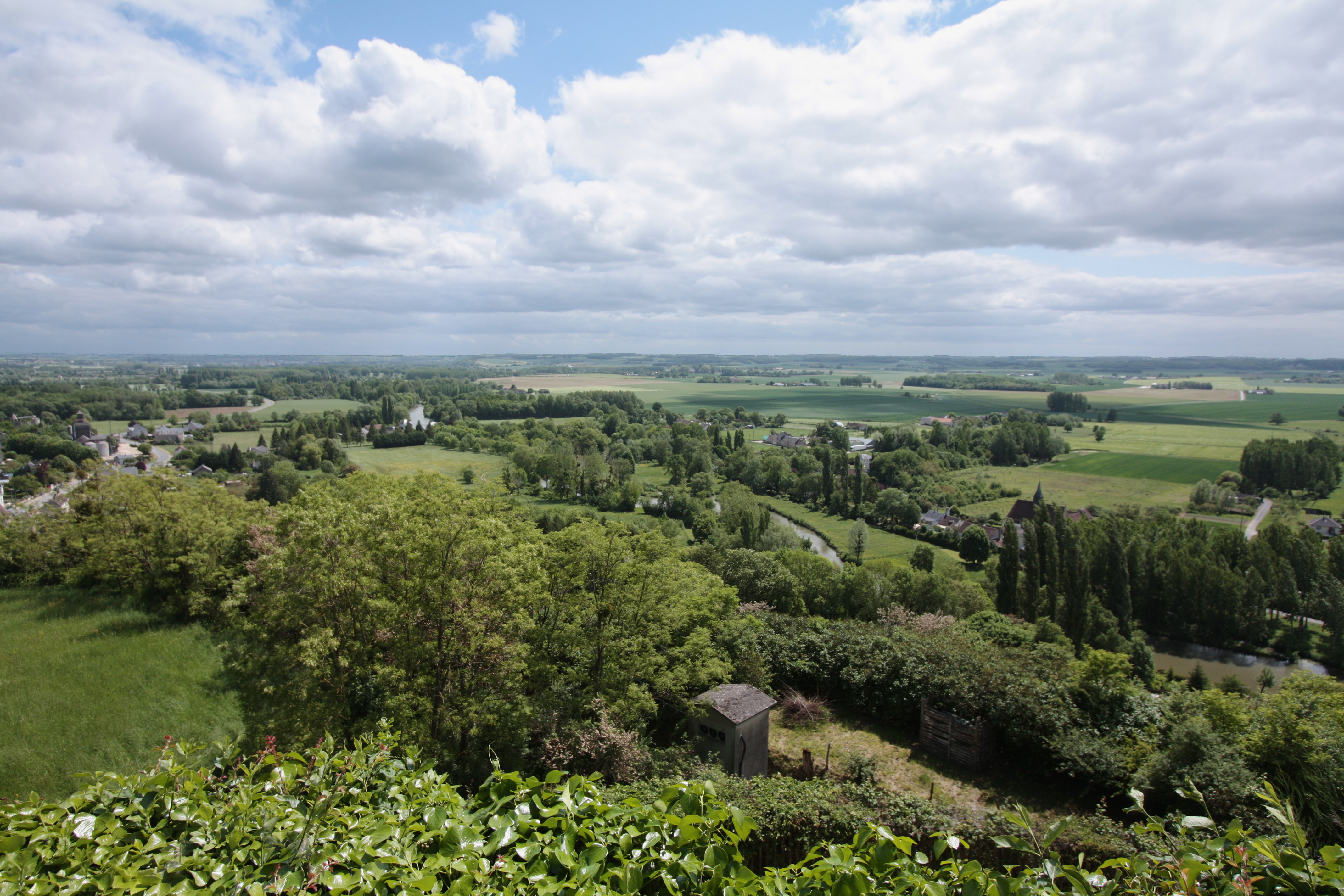 Trôo im Département Loir-et-Cher/Frankreich - Blick in die Ebene